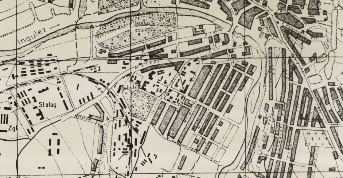 фрагмент плану м. Кривий Ріг часів німецької окупації